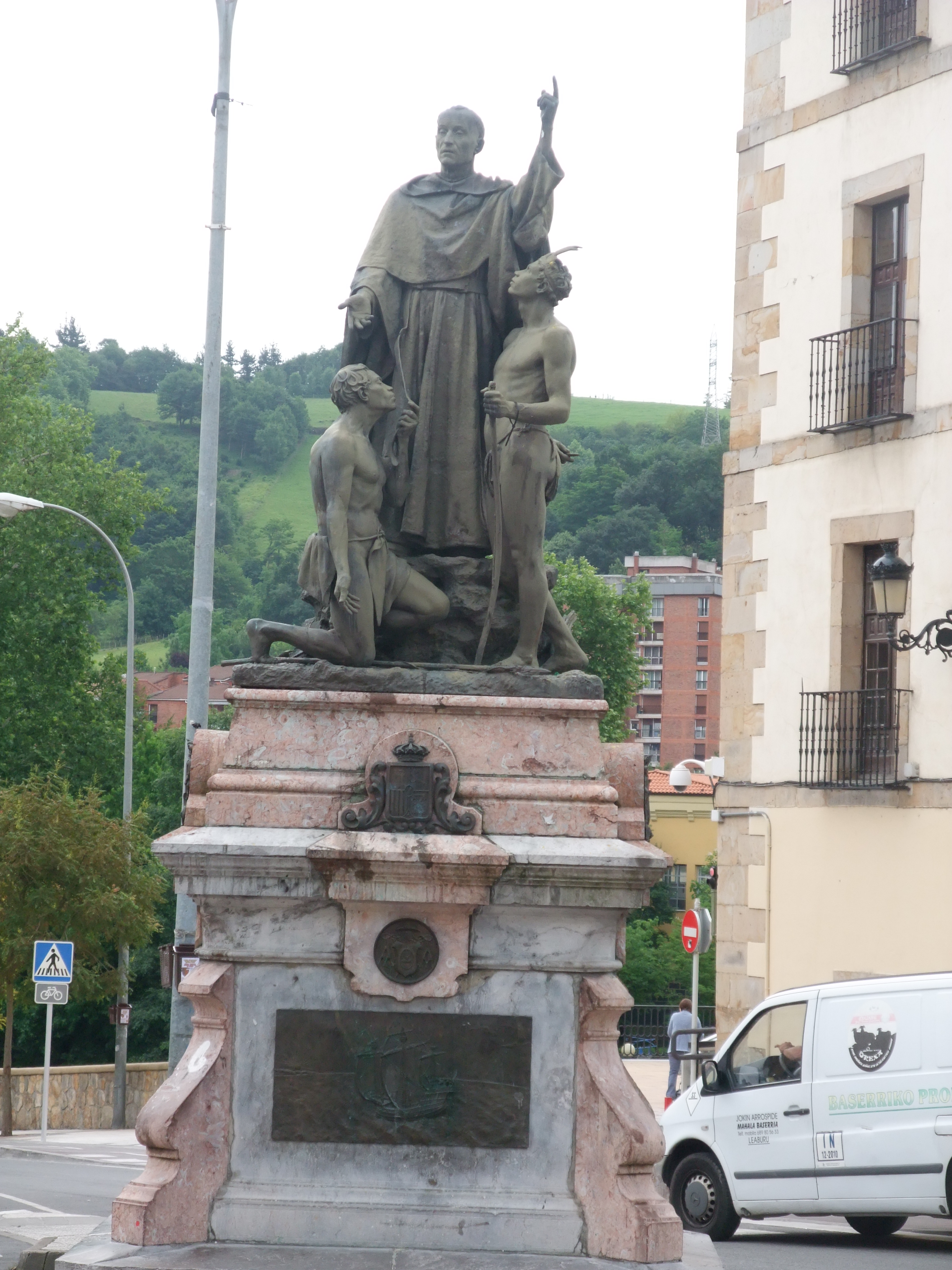 Villafranca de Ordicia (Guipúzcoa)-Monumento a Andrés de Urdaneta, descubridor de la ruta marítima entre Filipinas y Acapulco (tornaviaje)-2